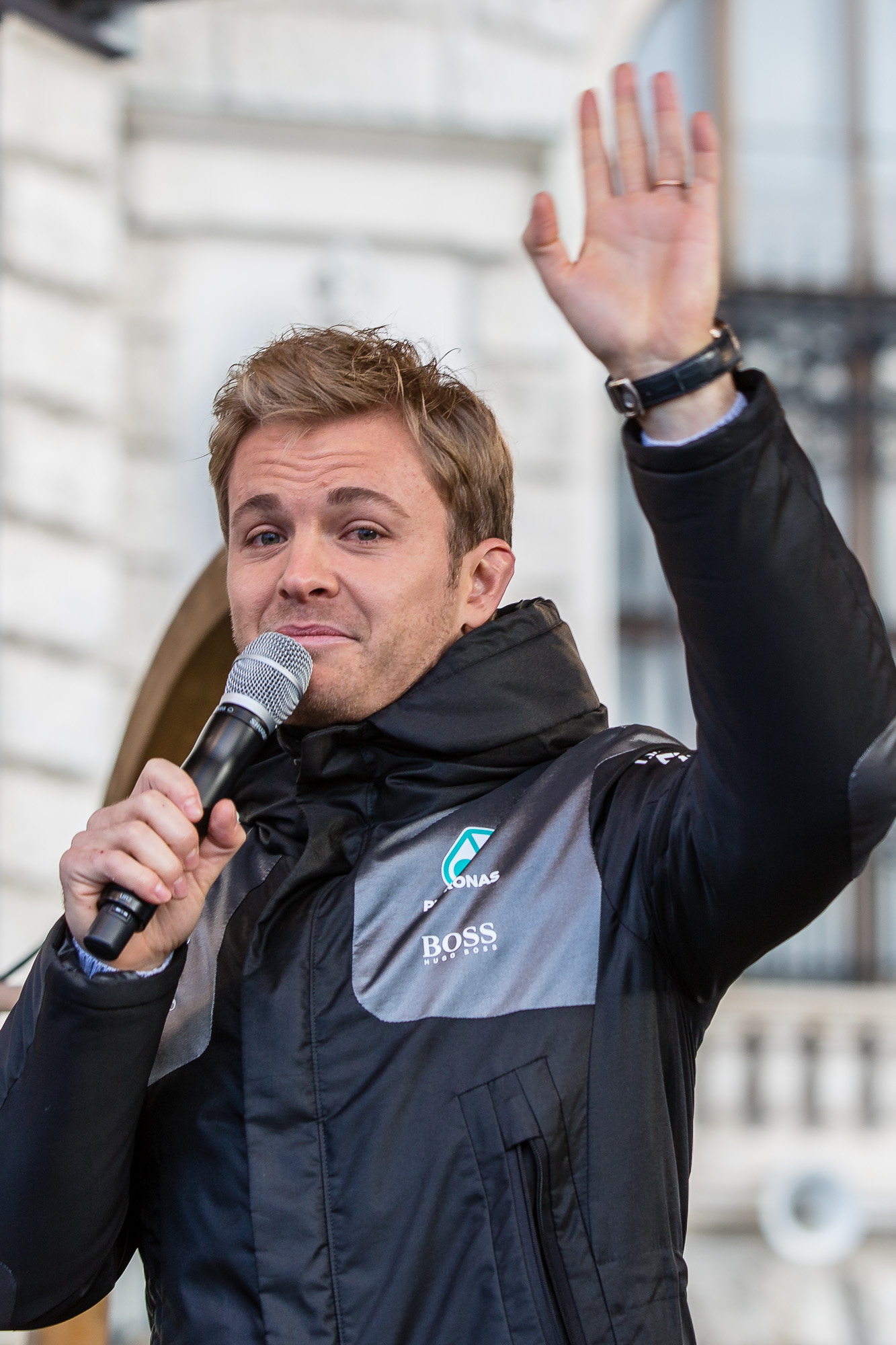 Nico Rosberg (Mercedes AMG Petronas F1 Team) bei der Publikumsveranstaltung "ÖAMTC Welt des Motorsports" Begleitend zu FIA Gala in der Wiener Hofburg am Freitag, 2. Dezember am Wiener Heldenplatz